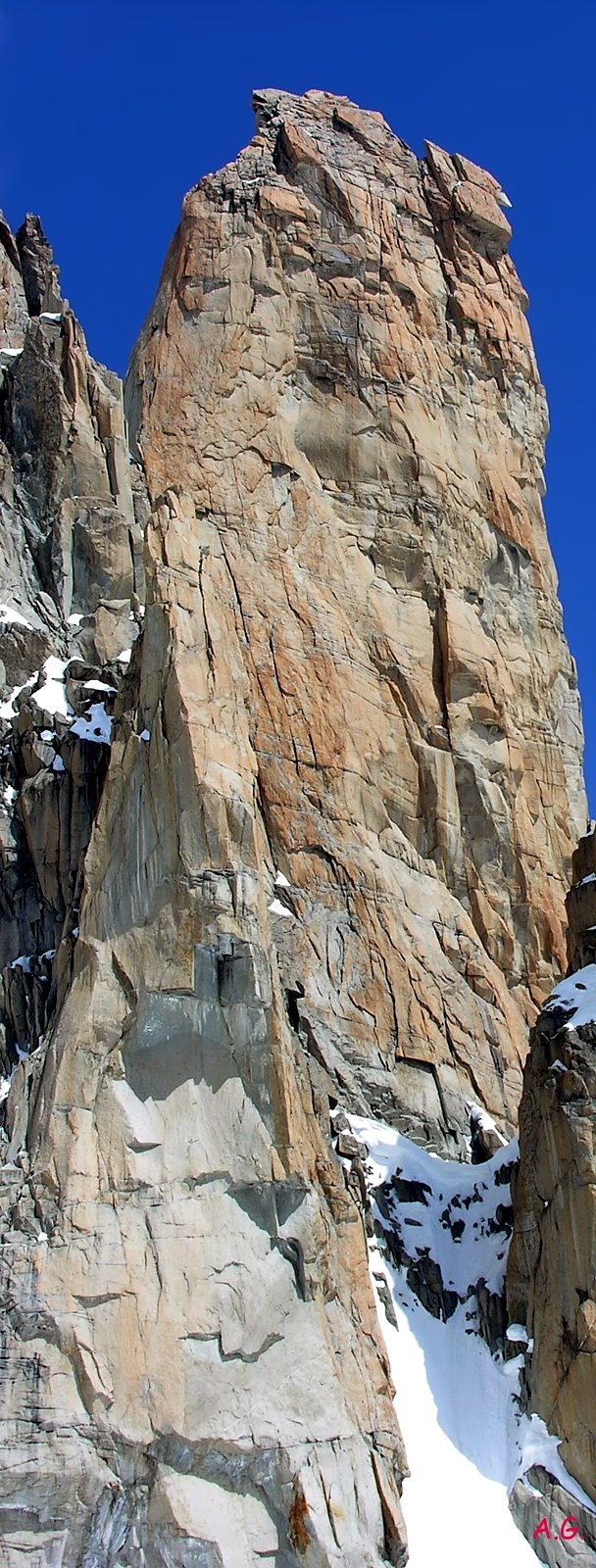 Il Grand Capucin visto dal Cirque Maudit - Alpi Graie - Italy